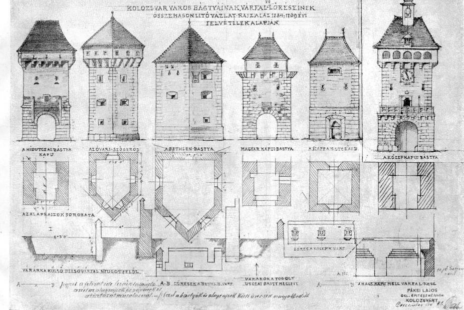 Kolozsvár bástyáinak, várfal-lőréseinek összehasonlító vázlatrajza